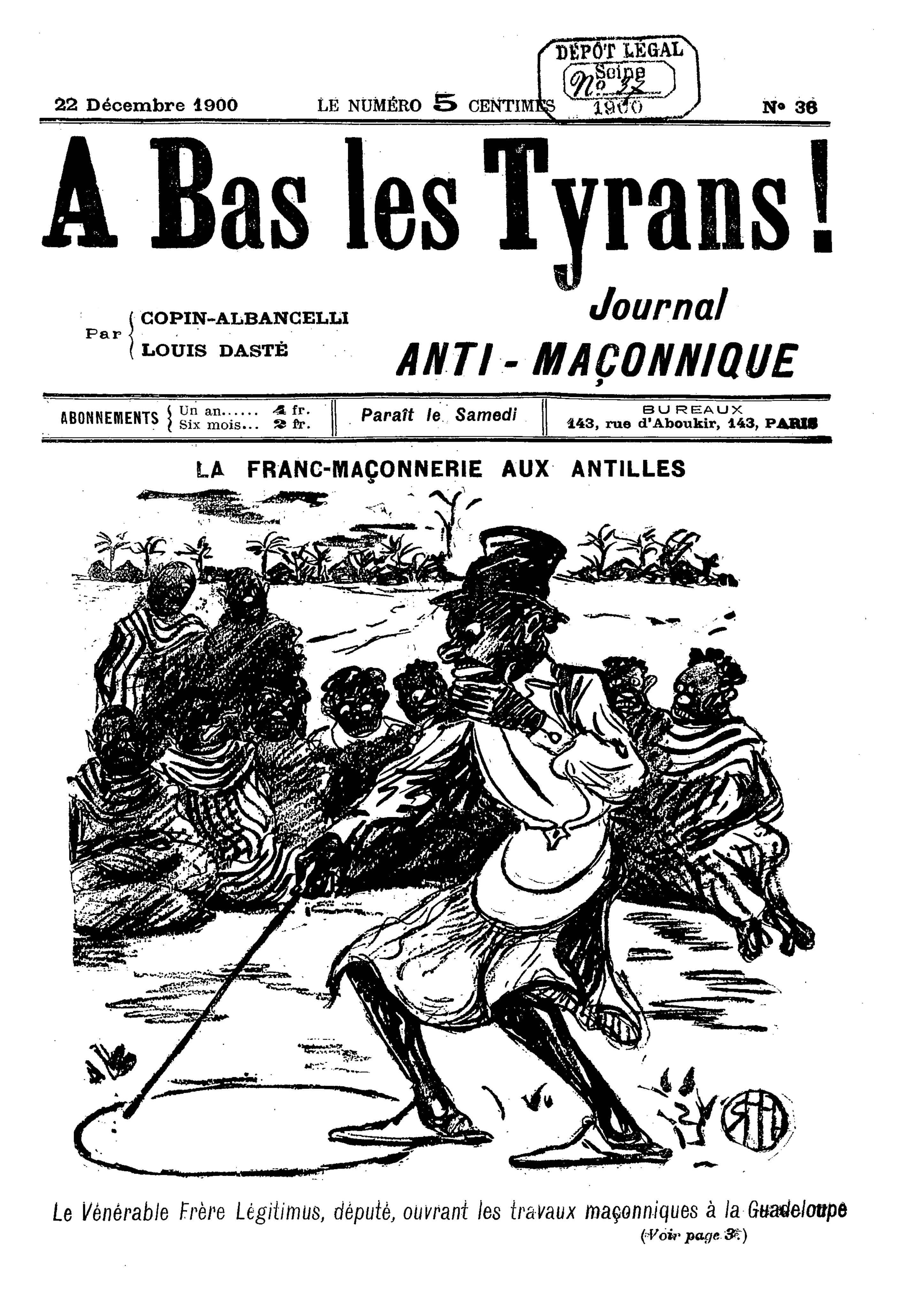 Caricature du journal antimaçonnique "A bas les tyrans" paru dans les numéros 36 du 22 décembre 1900 & 38 du 5 janvier 1901.